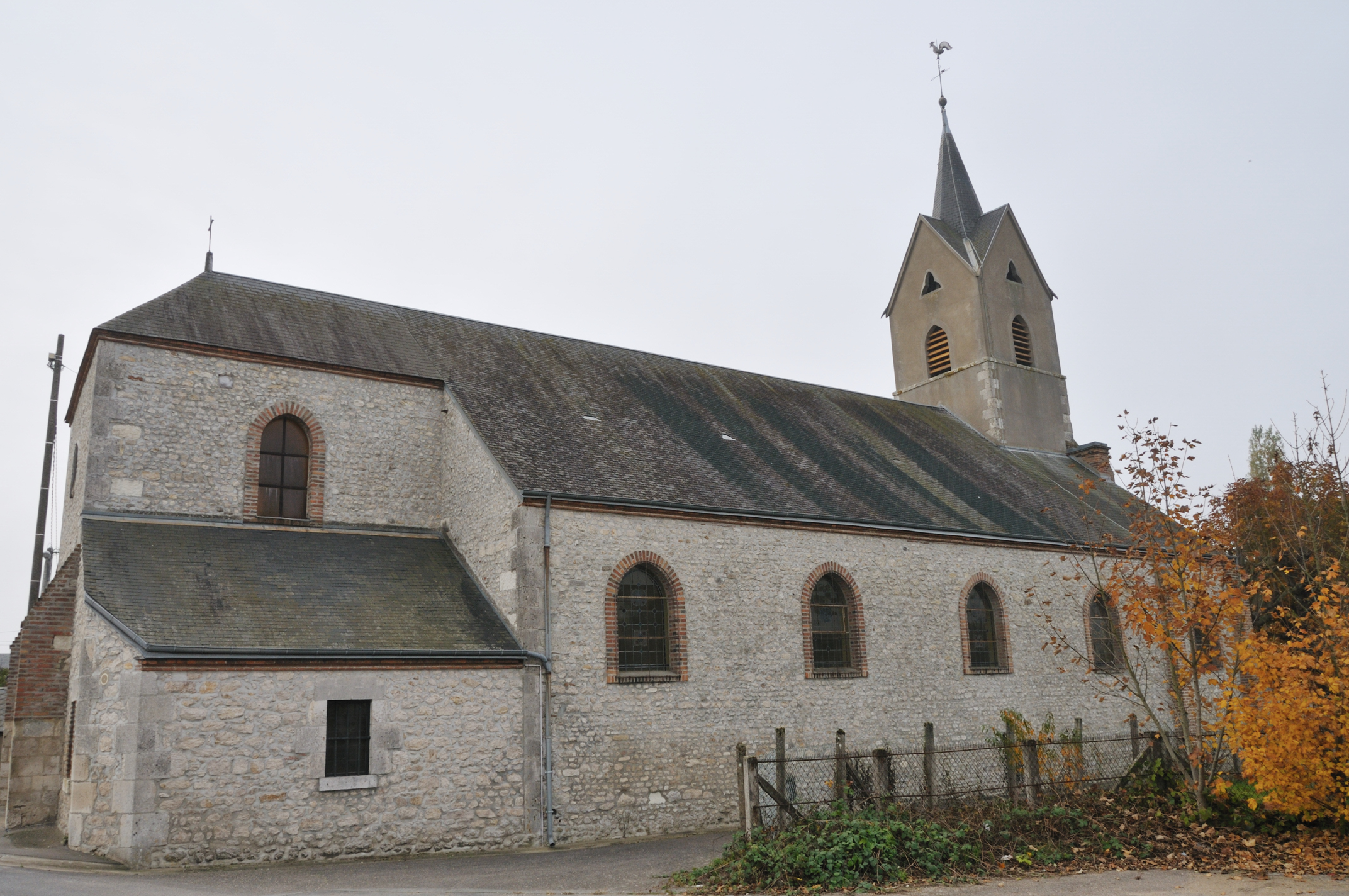 Église Saint-Martin de Cercottes, Loiret, France